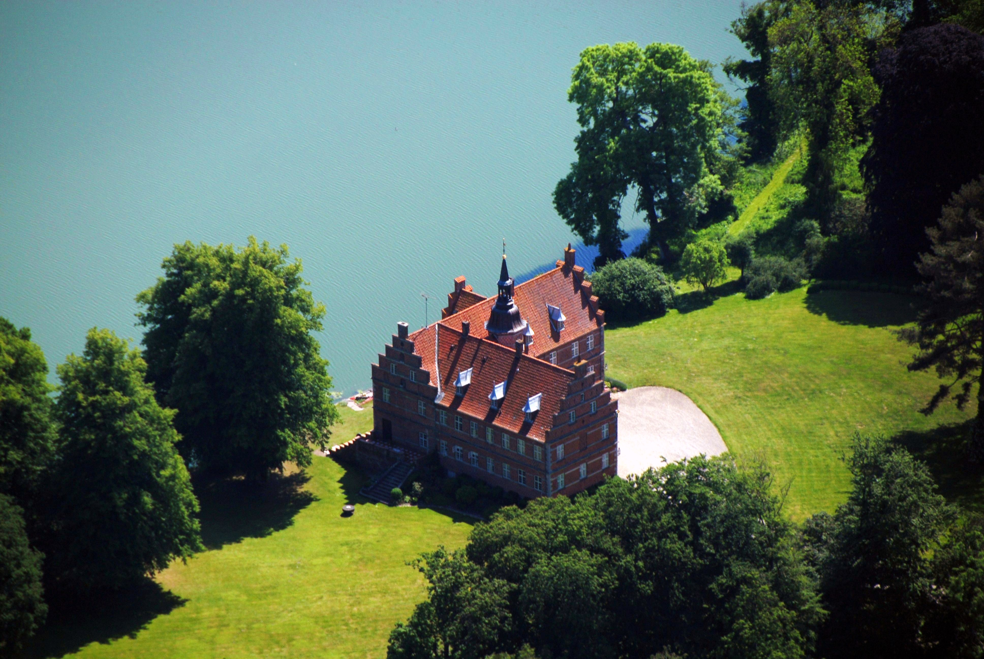 Rønninge Søgård